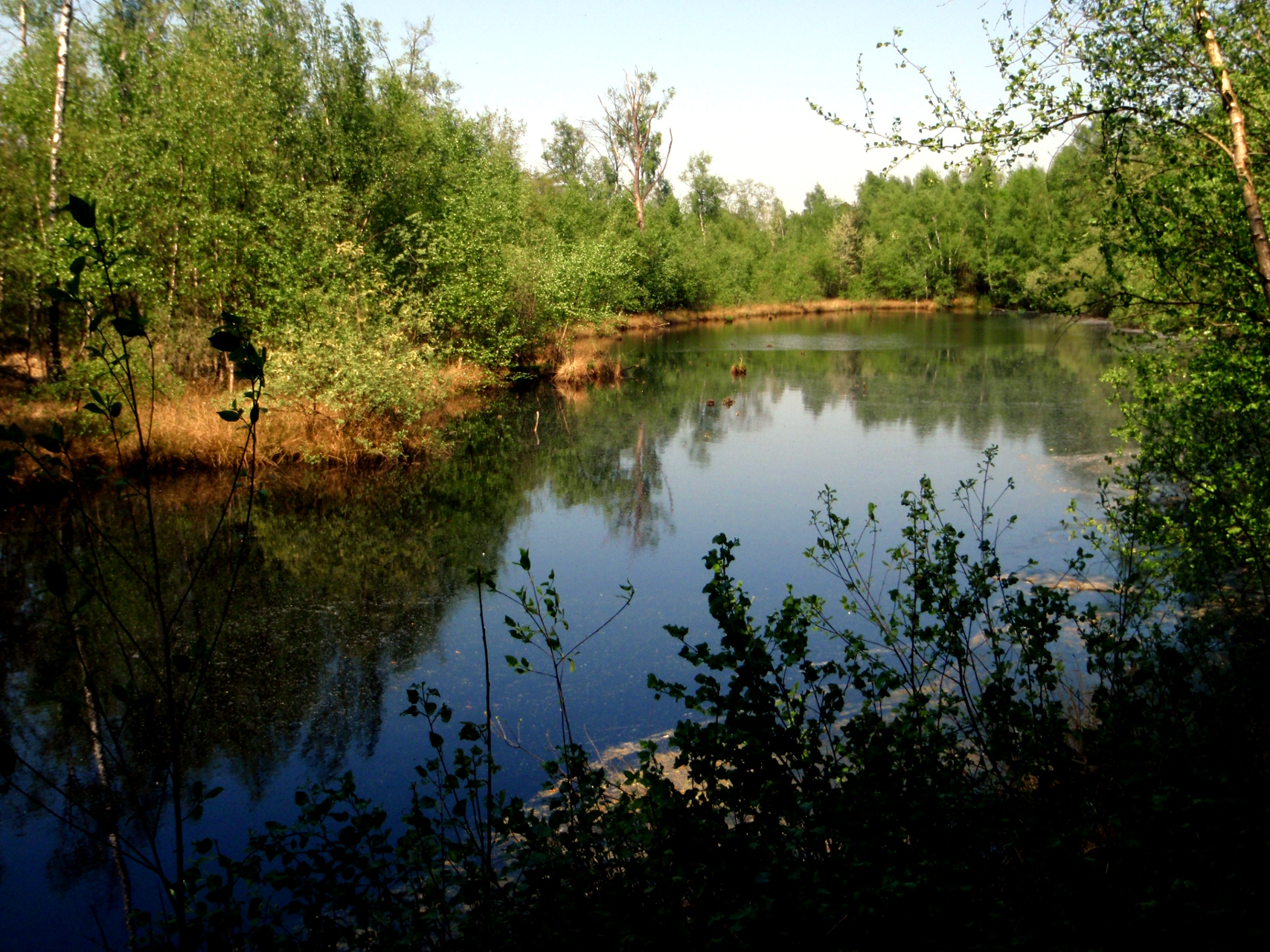 Das Burlo-Vardingholter Venn im Kreis Borken ist eines der bedeutendsten Moorgebiete des Westmünsterlandes. Das Foto zeigt einen Blick vom Damm, der das Wasser im Moor halten soll, ins Innere des Naturschtzgebietes.